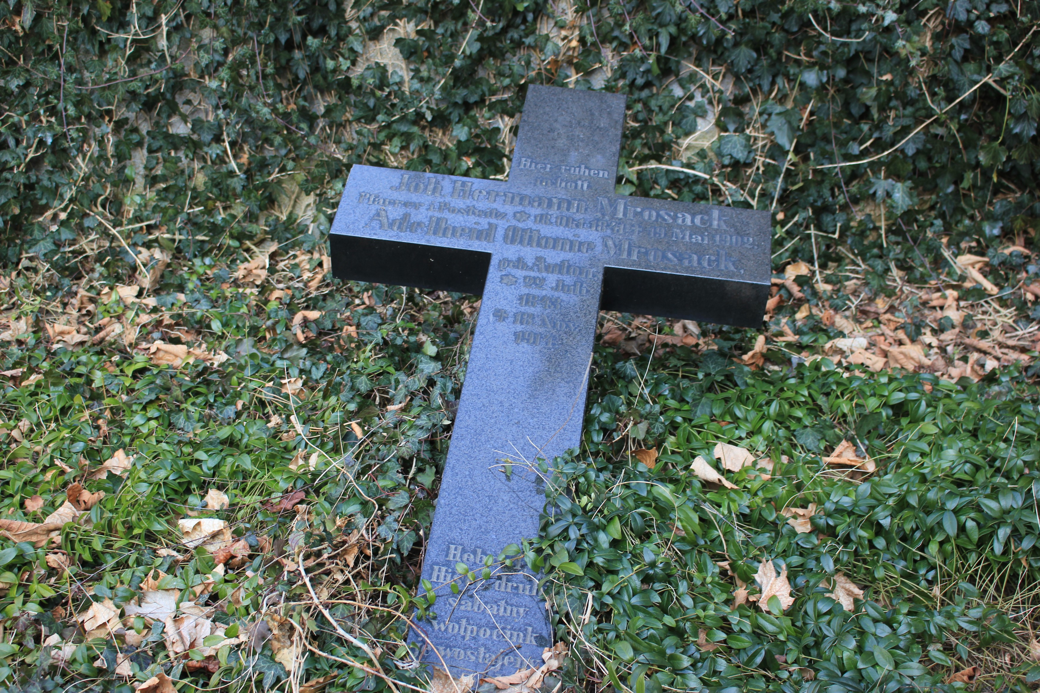 Hornjoserbsce: Na starym kěrchowje při Budestečanskej ewangelskej cyrkwi; narowny křiž fararja Mrózaka.